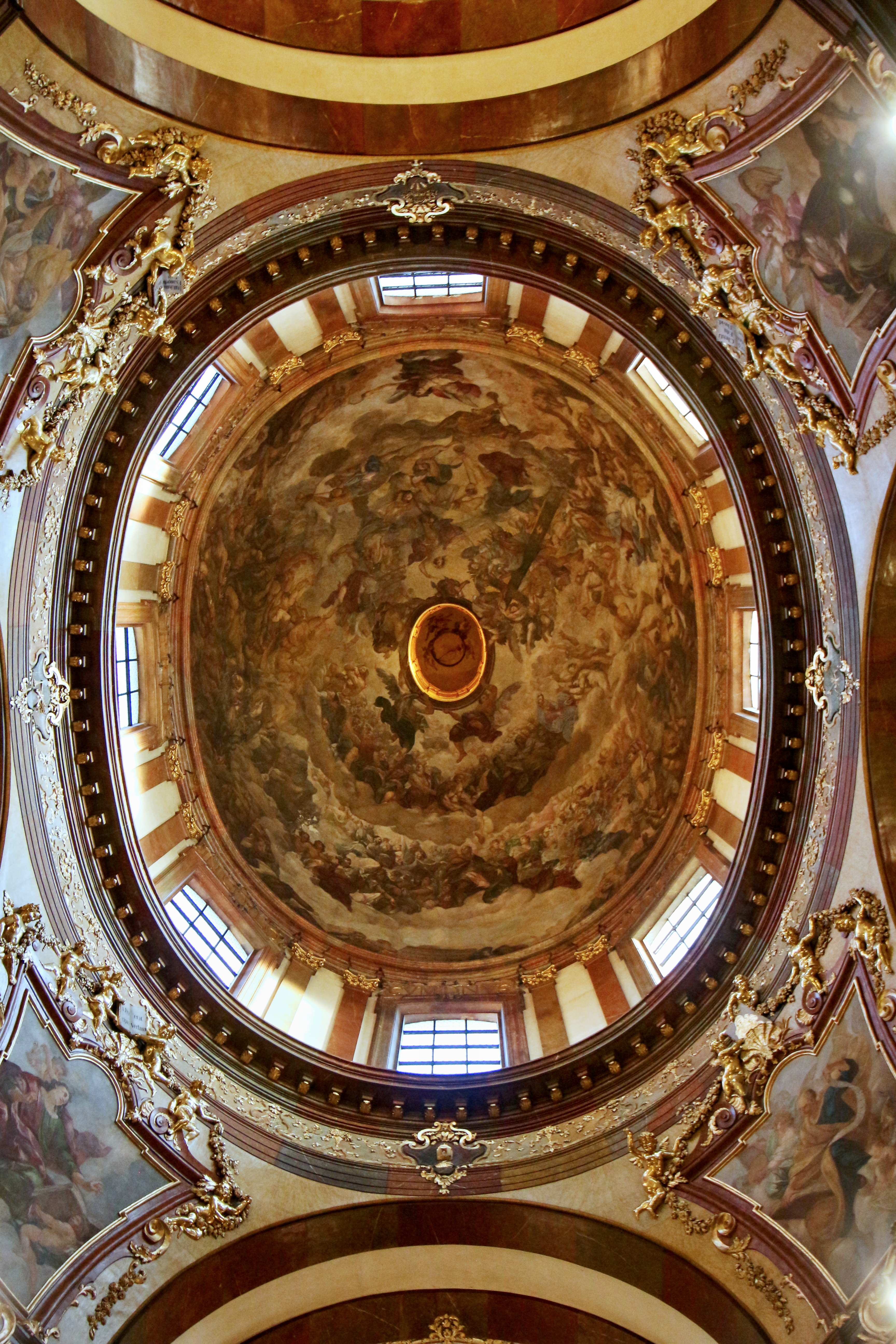 Praha 1-Staré Město, interiér kostela sv. Františka z Assisi u křižovníků